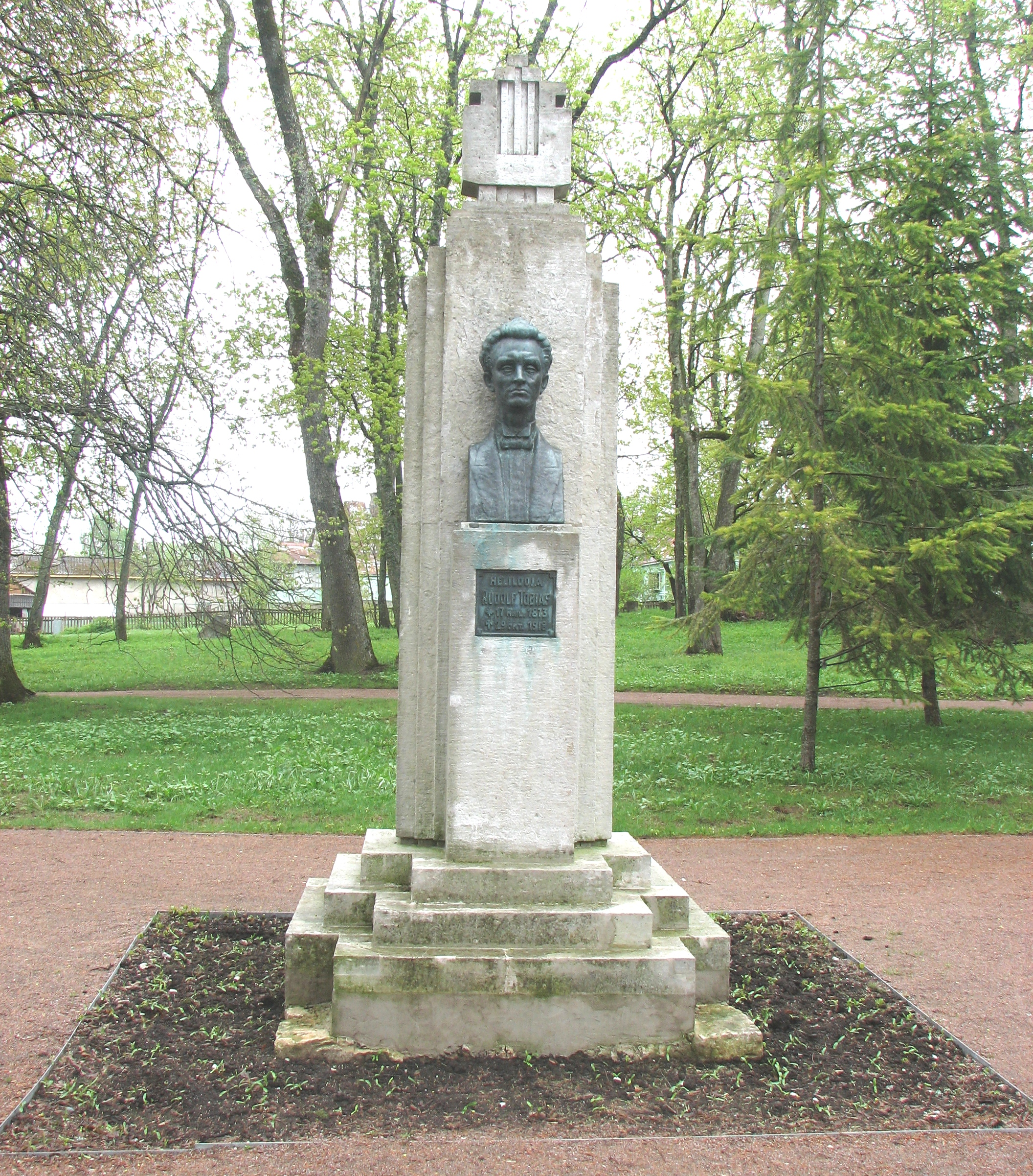 Rudolf Tobiase monument Promenaadi 3 Haapsalus